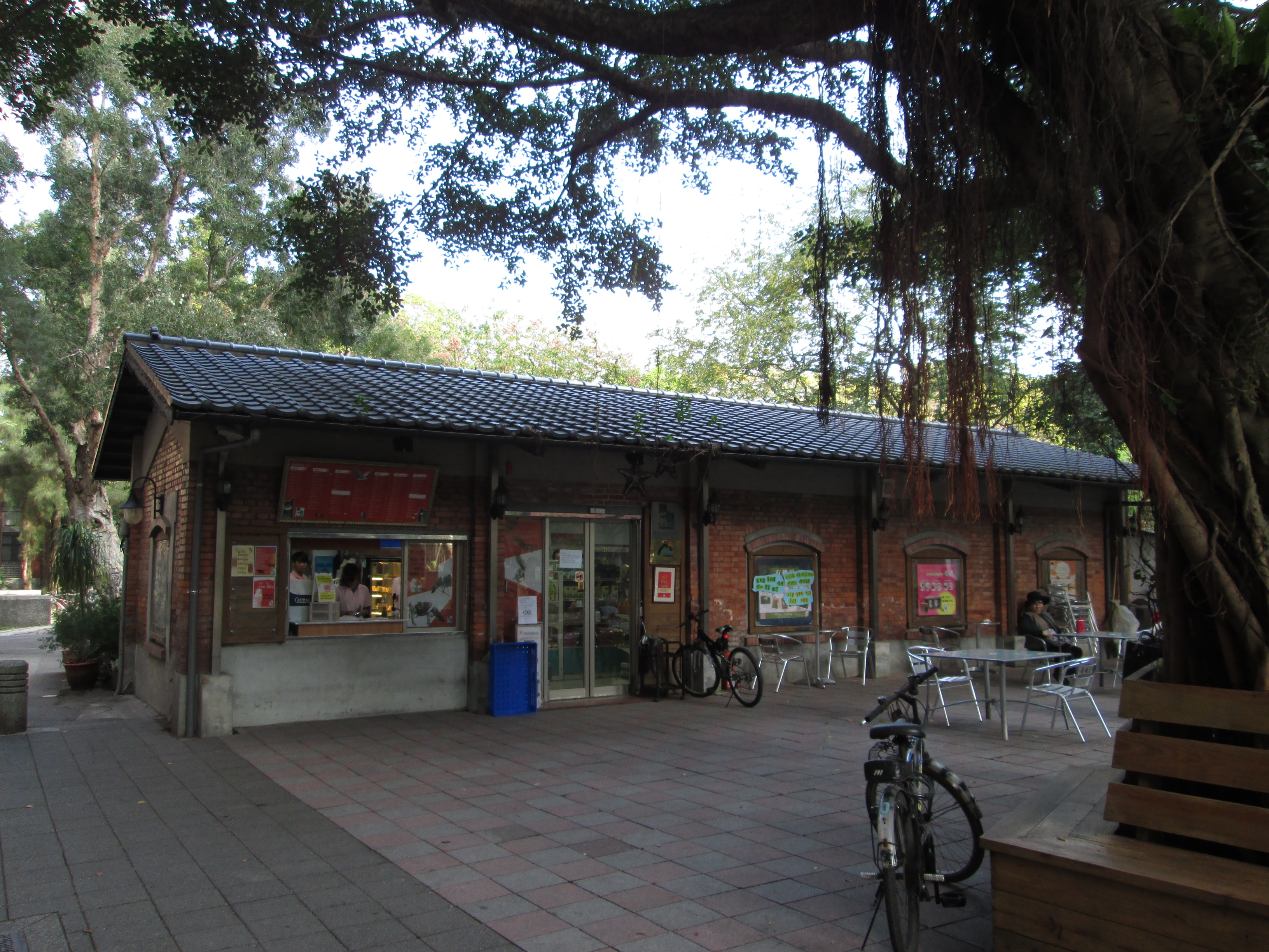 臺大農產品展示中心。